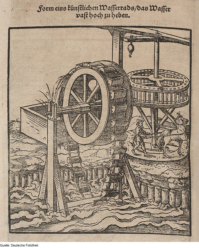 Original image description from the Deutsche Fotothek Wasserförderung & Wasserkraft & Rad